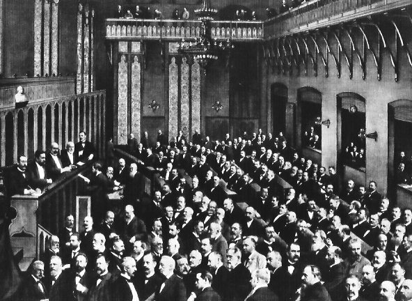 Sitzung der Hamburgischen Bürgerschaft 1897. Darstellung noch am alten Sitzungsort, im Haus der Patriotischen Gesellschaft (heute der dortige Reimarus-Saal).This is a photograph of an architectural monument.